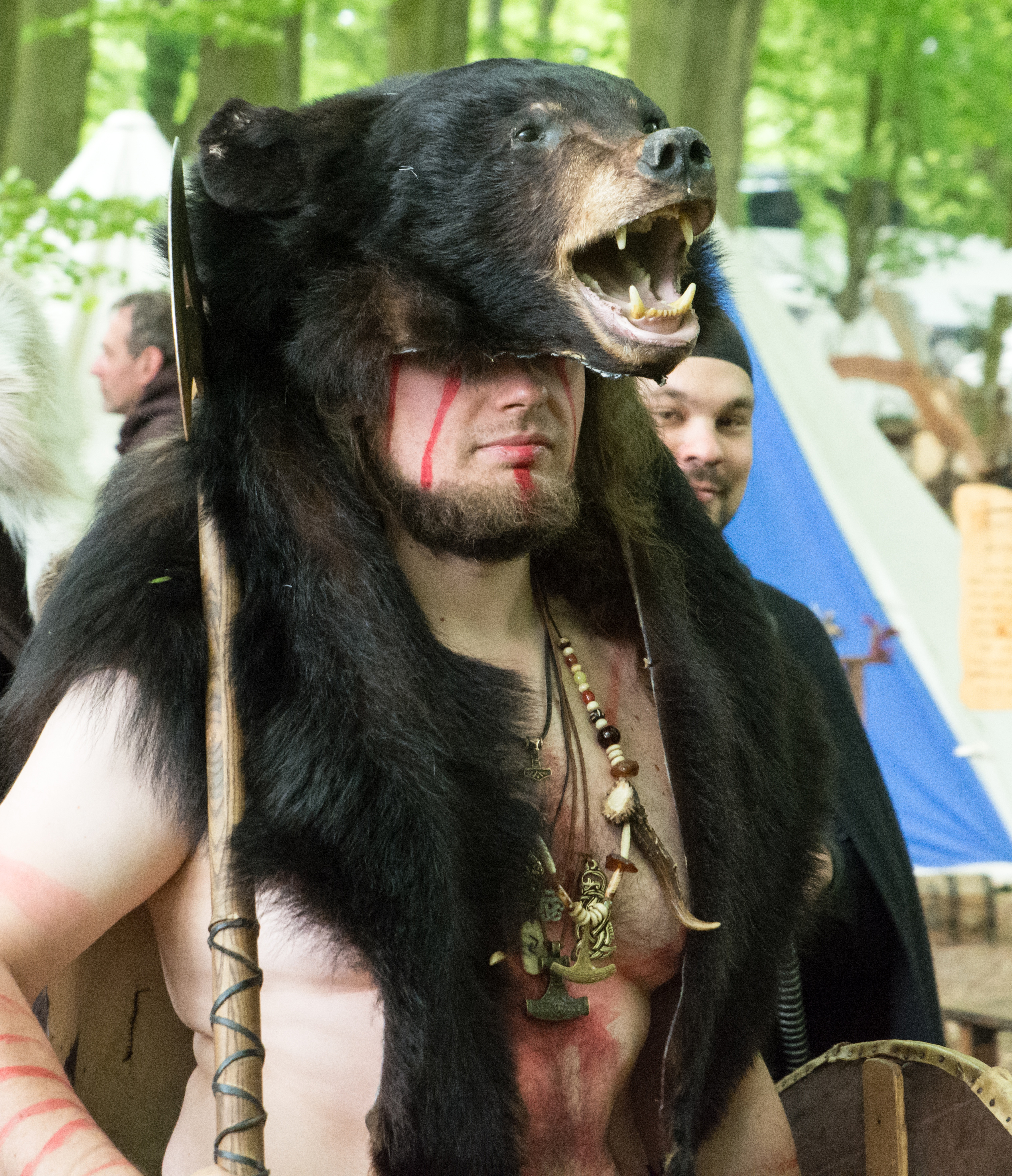 'Impressionen vom MPS Hohenweststedt 2016